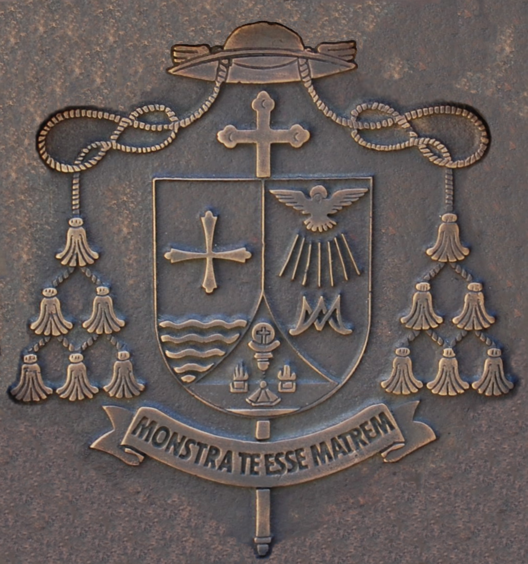 Escudo en acero corten del obispo Juan Antonio Reig Pla. Localizado en la puerta de la Capilla de las Santas Formas de Alcalá de Henares (Comunidad de Madrid - España).